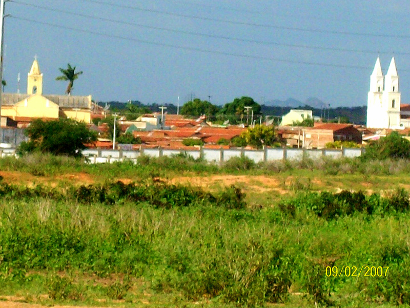 Vista da cidade pela saída do Bairro Pereiras